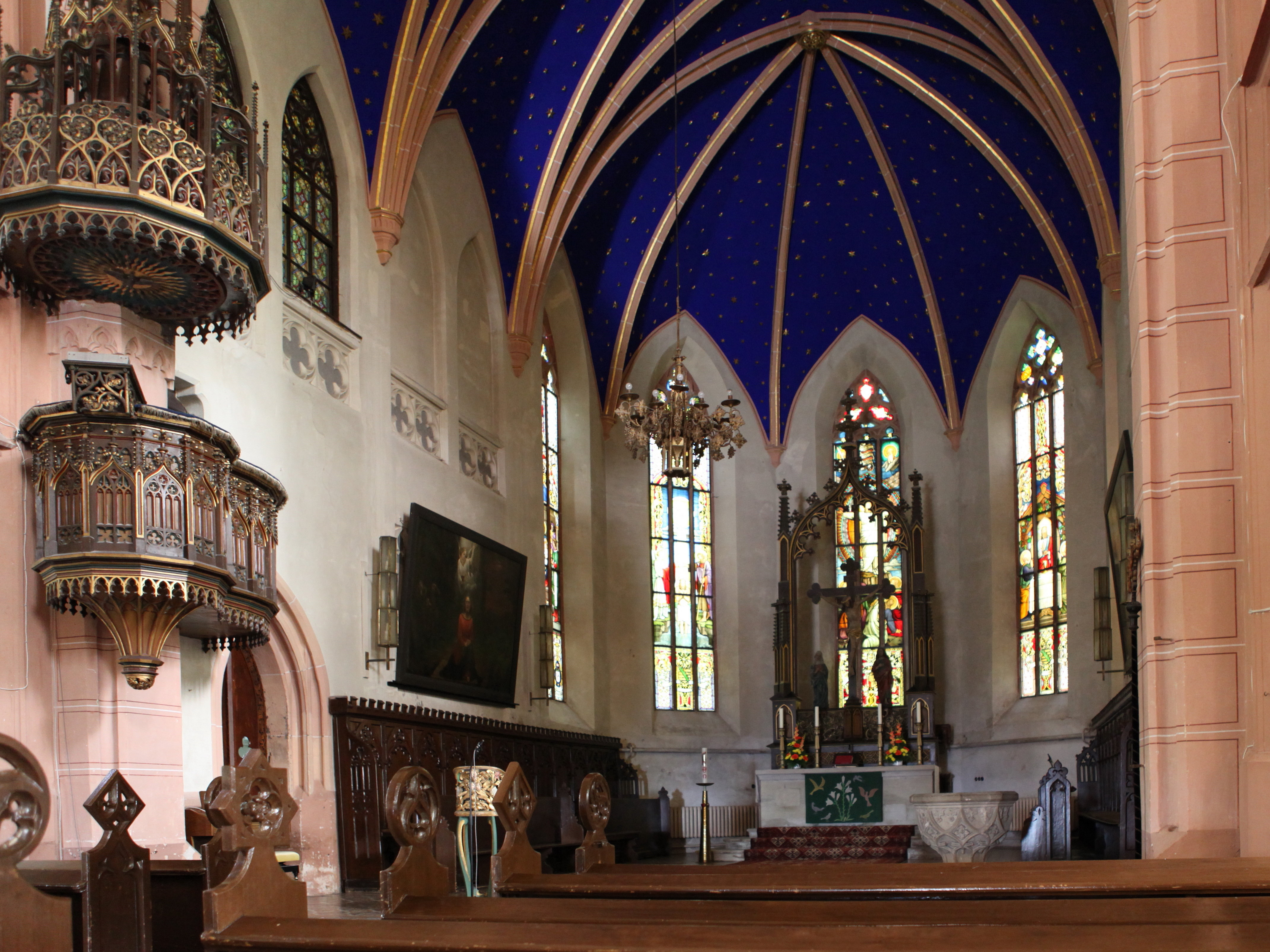 Chor der Ev.-Luth. Stadtkirche St. Peter, neugotische Hallenkirche, 1843-45, Carl Alexander von Heideloff, Sonneberg, Kirchstraße 37